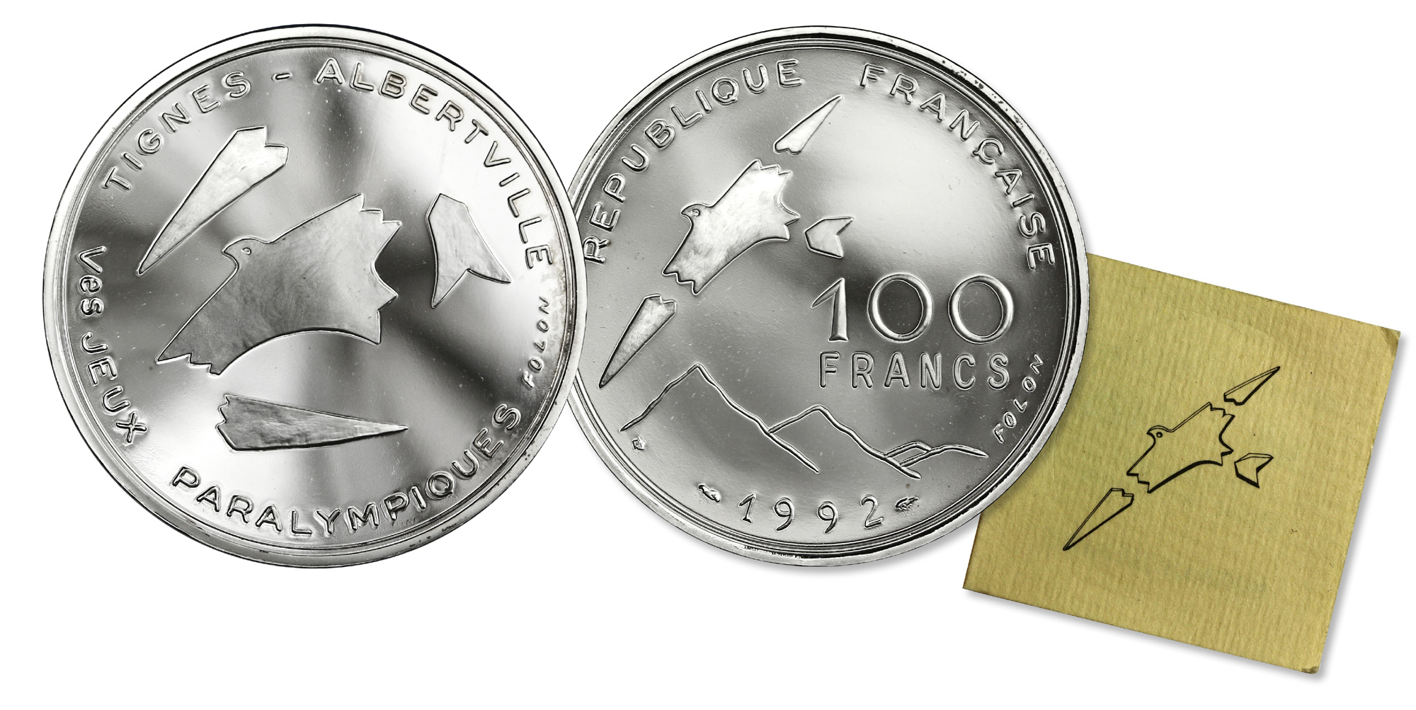 Date : 1992 Quantité frappée : 2930 exemplaires Métal : argent Diamètre : 37mm Axe des coins : 6h. Titulature avers : TIGNES - ALBERTVILLE / Ves JEUX PARALYMPIQUES/Folon. Description avers : Oiseau brisé. Titulature revers : REPUBLIQUE FRANÇAISE/1992//100 FRANCS//FOLON. Description revers : Oiseau brisé survolant des montagnes.